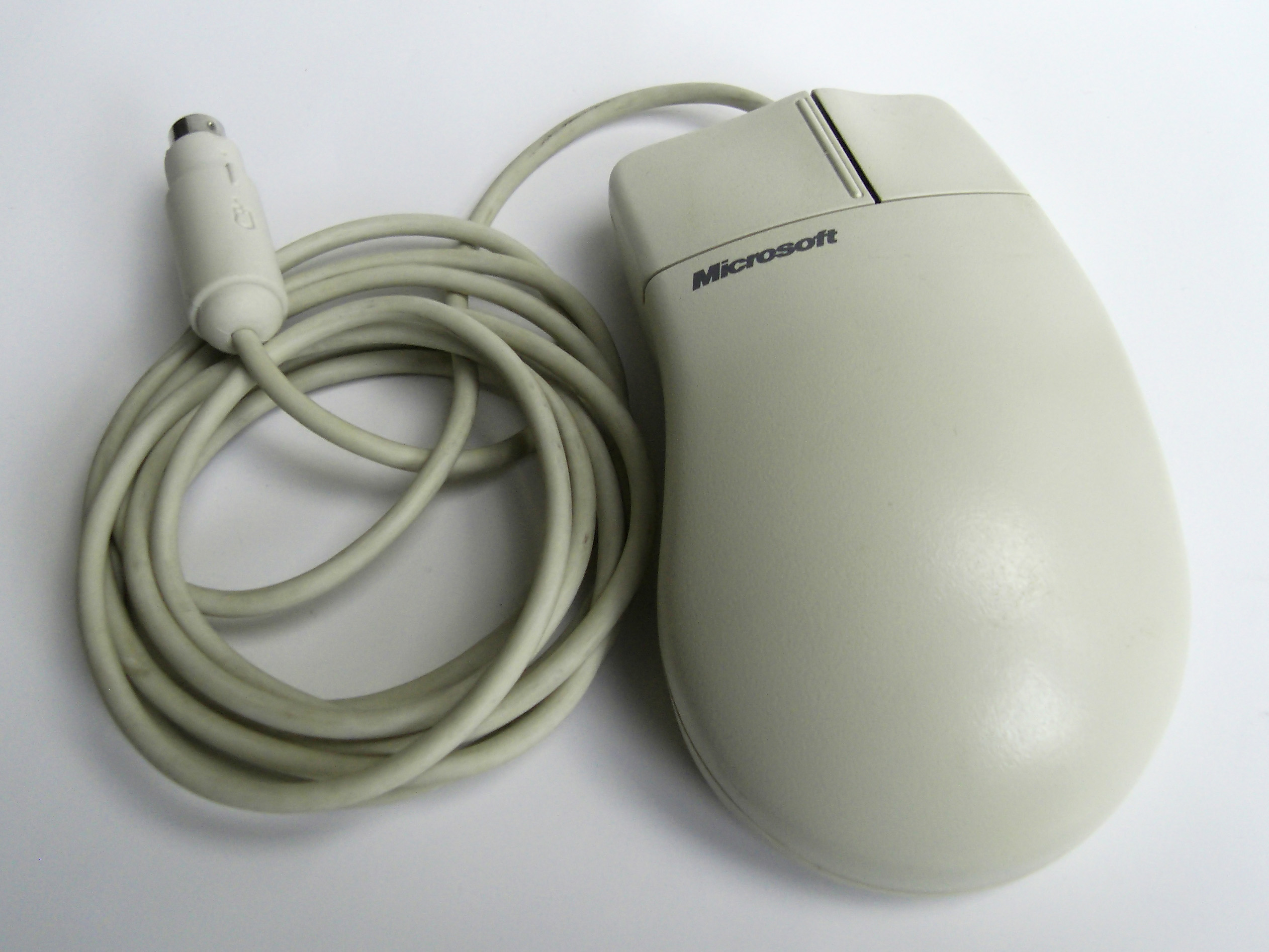 Computermaus Microsoft PS2